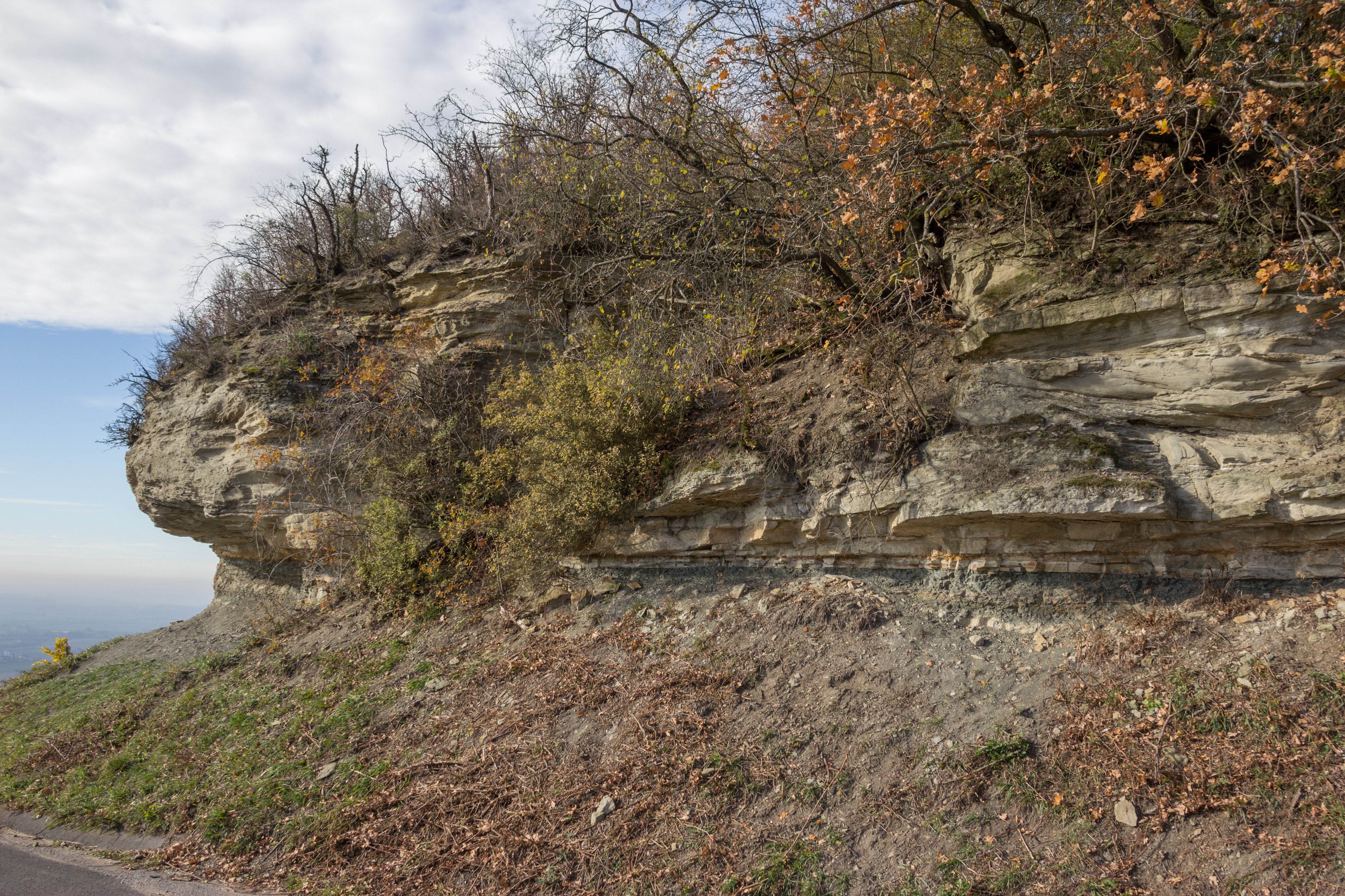 Aufschlüsse, Geotop, Iphofen, Gipskeuper am Schwanberg